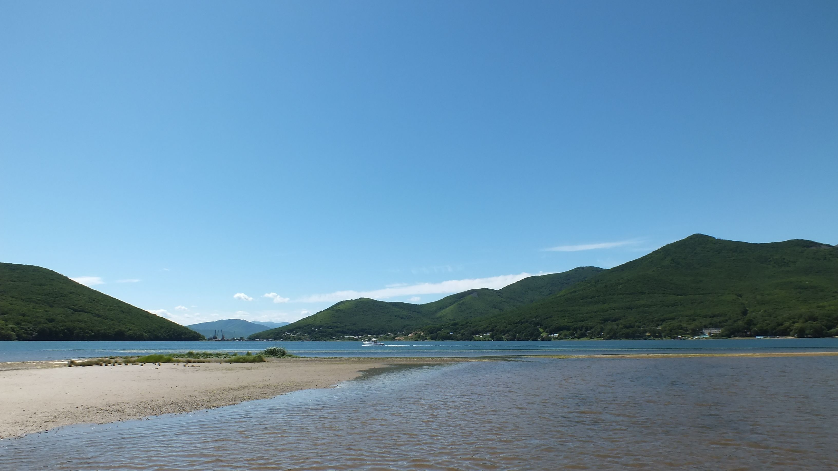 Olga, Primorsky krai